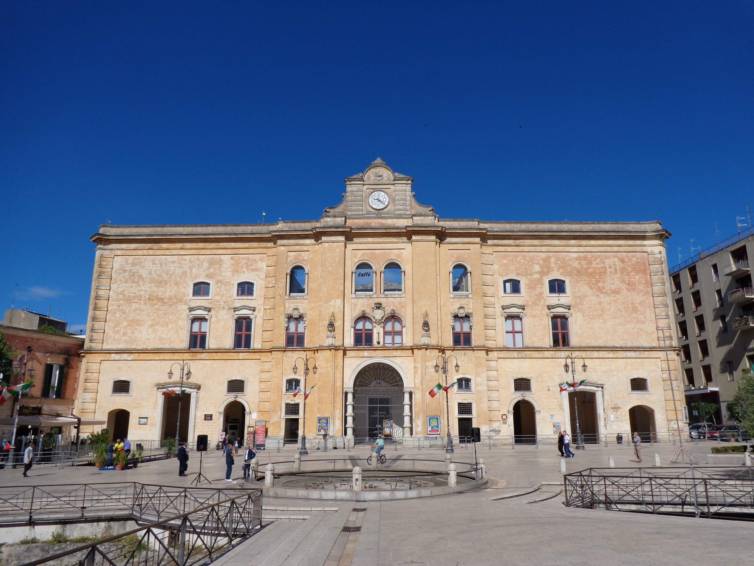 Palazzo dell'Annunziata, Matera)